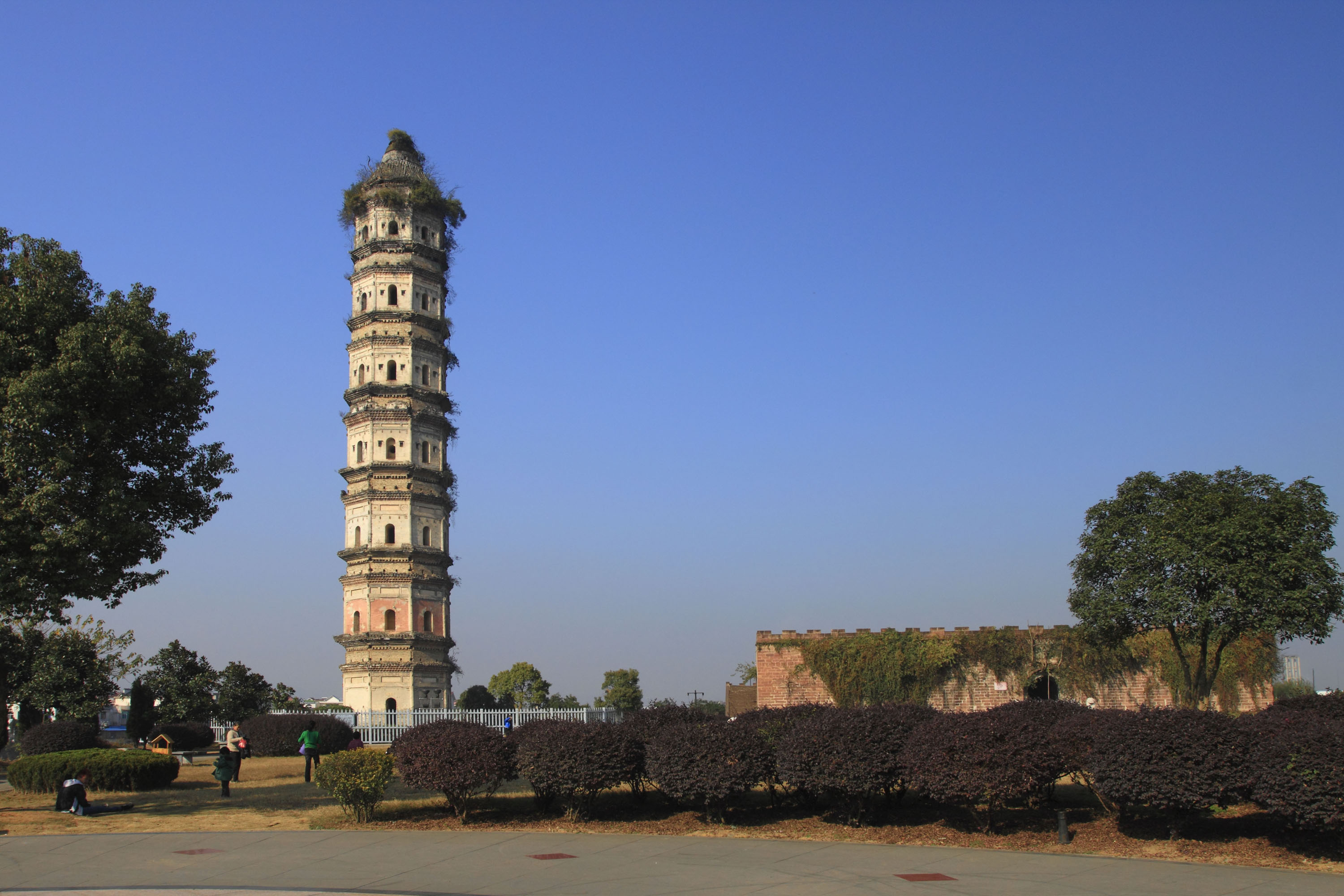 黄山市徽州区岩寺文峰塔与凤山台